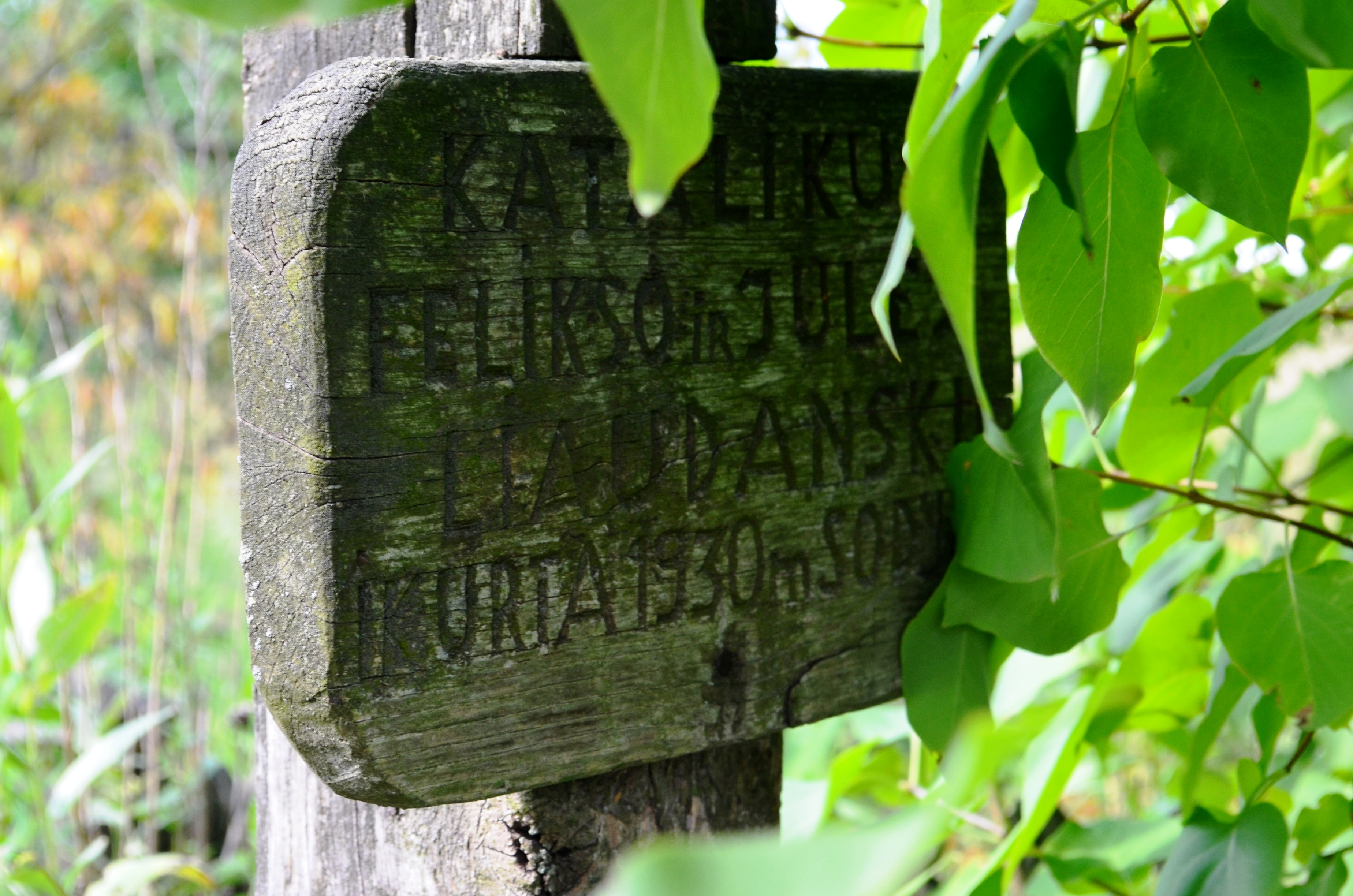 Įrašas ant sodybos medinio kryžiaus: "KATALIKŲ FELIKSO IR JULĖS LIAUDANSKŲ ĮKURTA 1930 m. SODYBA", Ledai, Kėdainių raj.